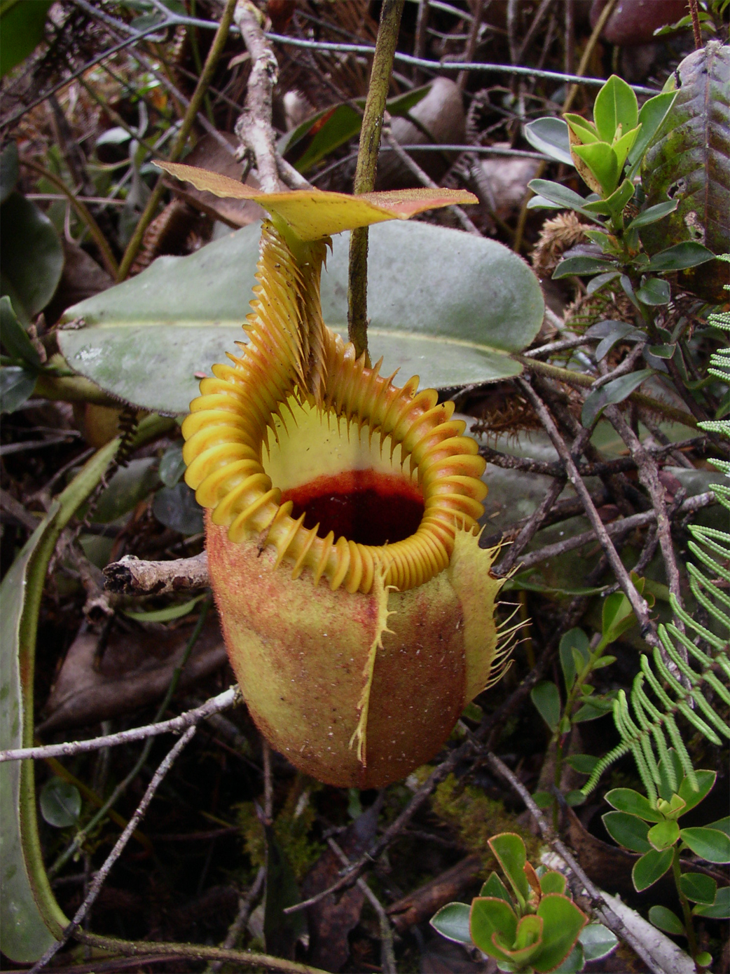 Photo taken in natural habitat.